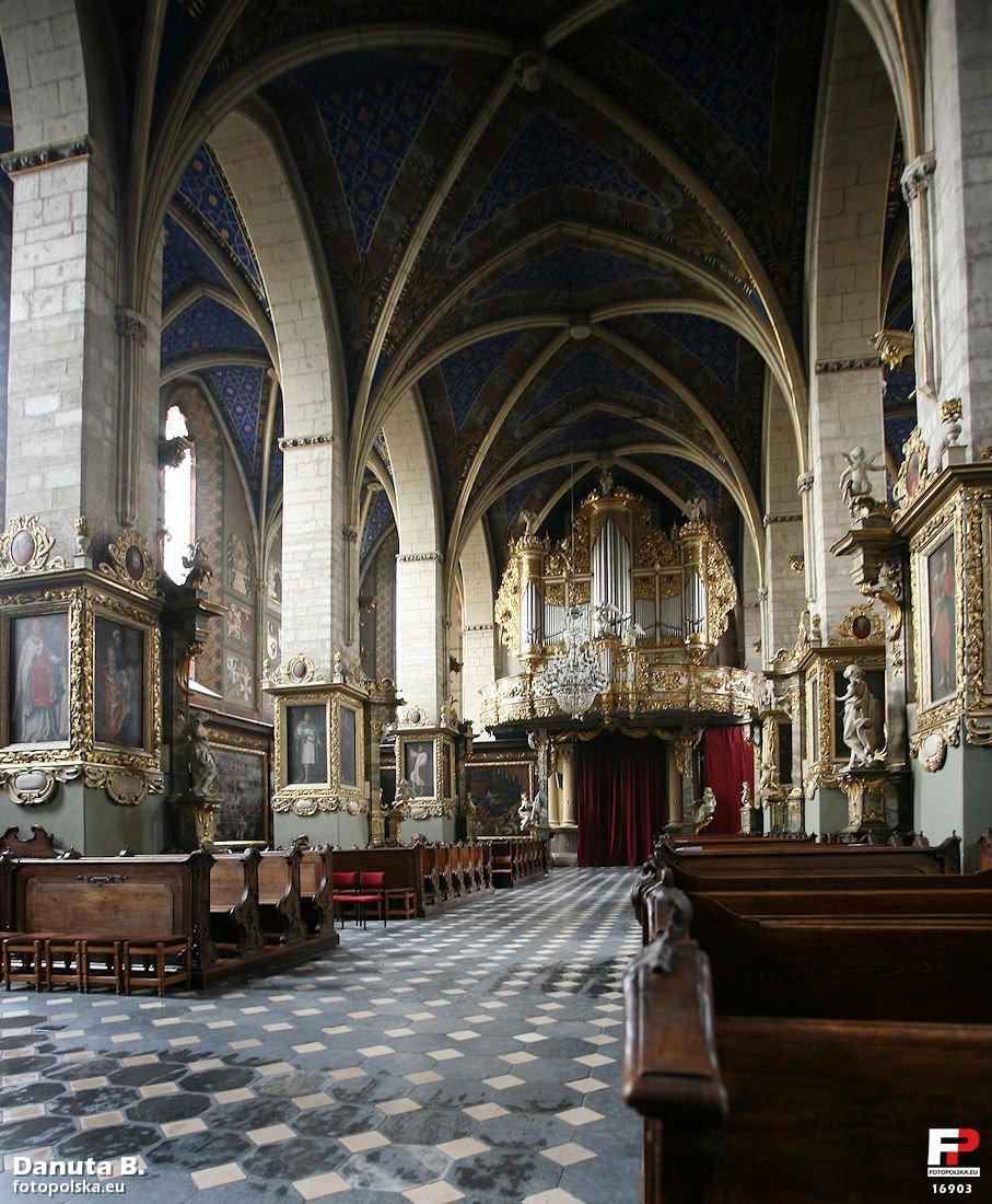 Widok na nawę główną, w głębi wspaniałe organy.